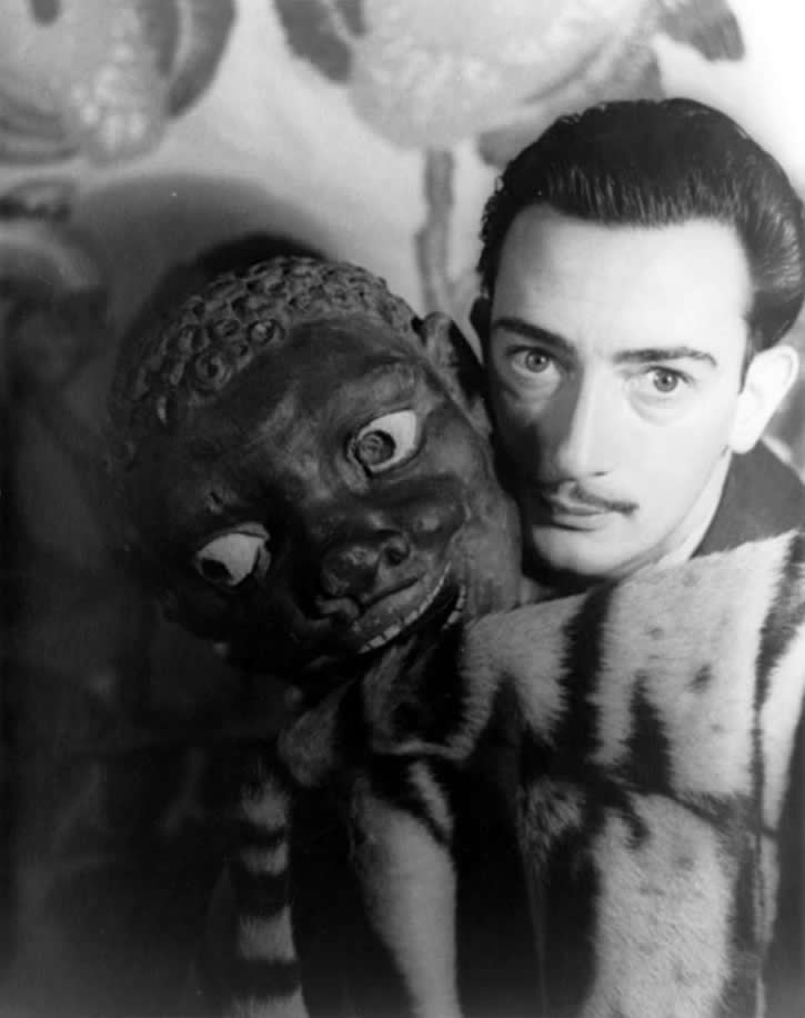 Salvador Dalí, 29 November 1939